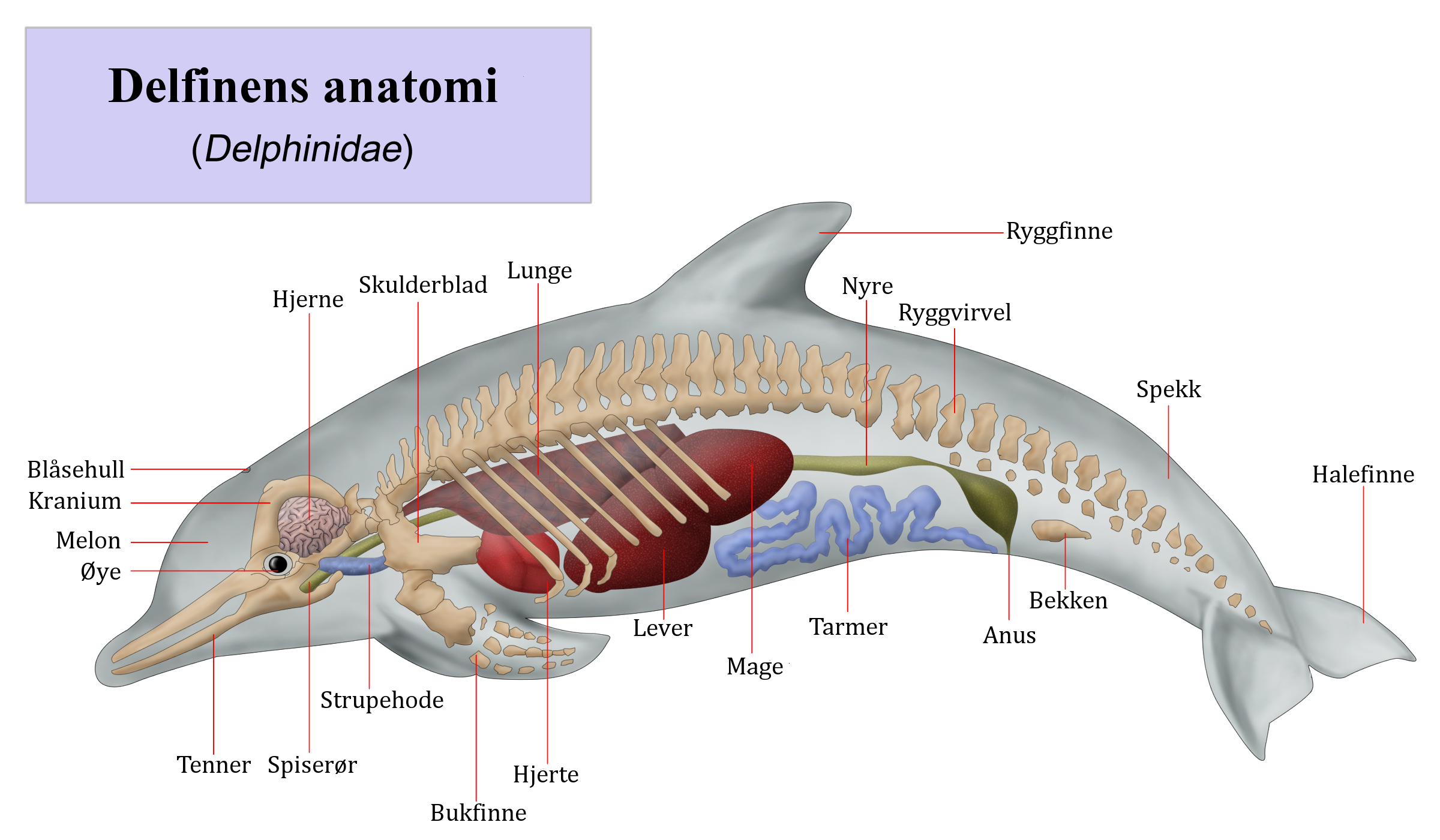 Delfinens anatomi